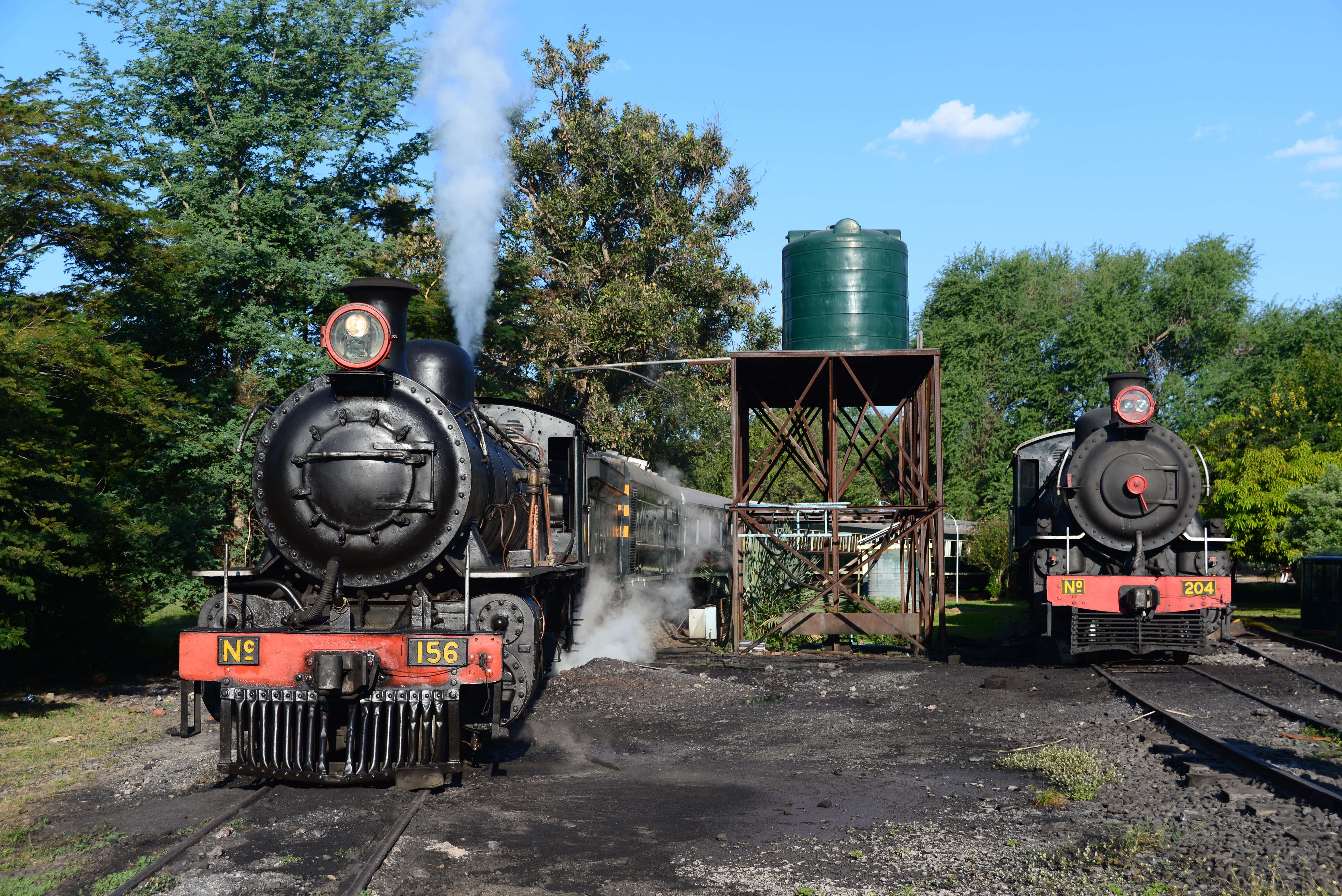 Lok 156 (Class 10) und 204 (Class 12) im Bushtracks Depot in Livingstone am 10. Mai 2017